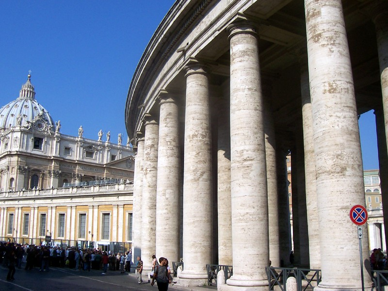 Città del Vaticano - Colonnato di Piazza S. Pietro